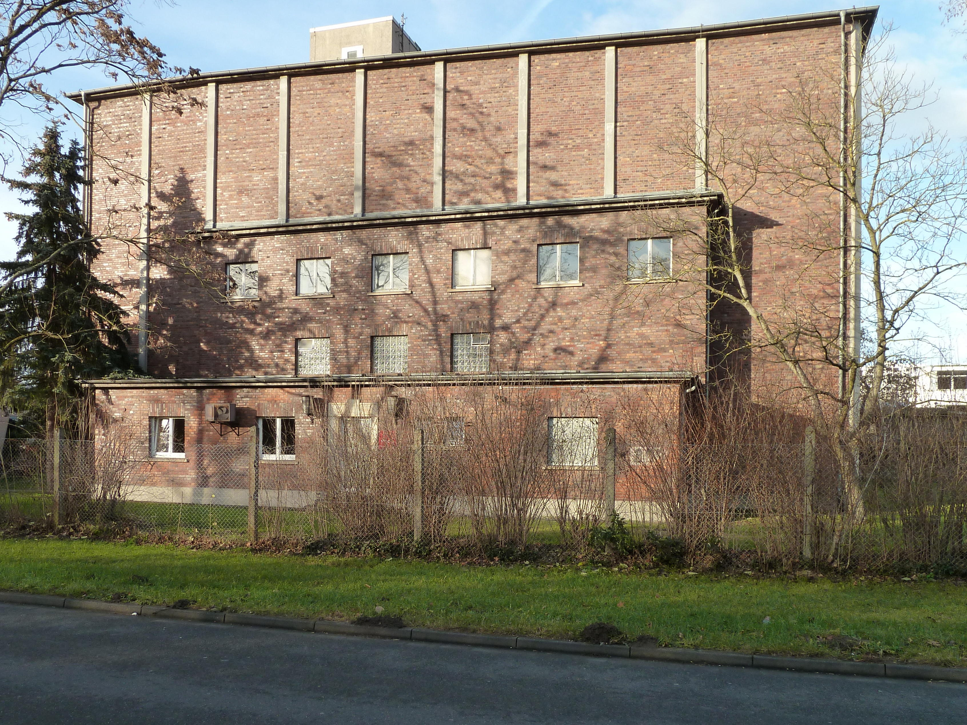 Griesheim, TUD Windkanal